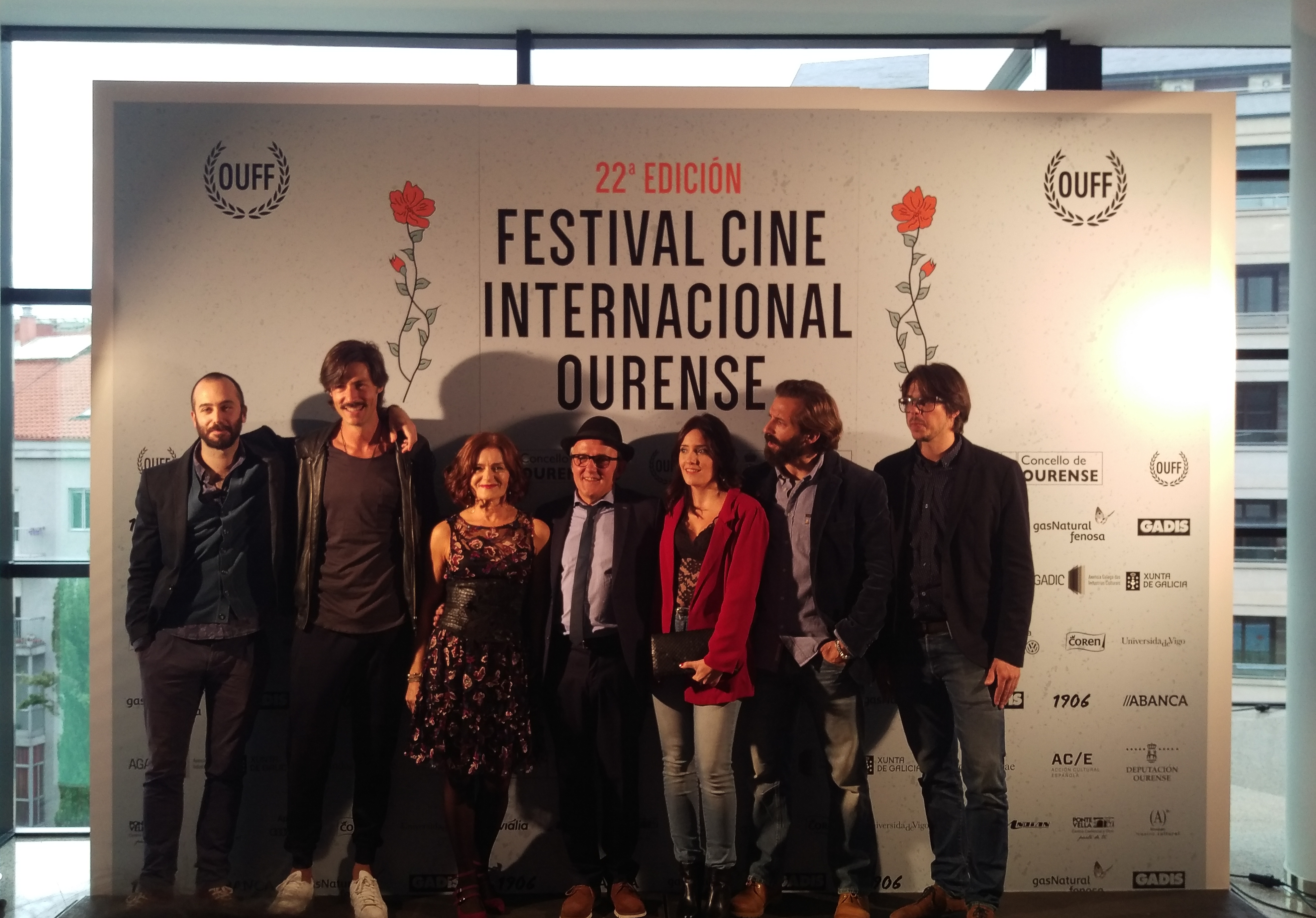 Actores e Andrés Goteira no OUFF.